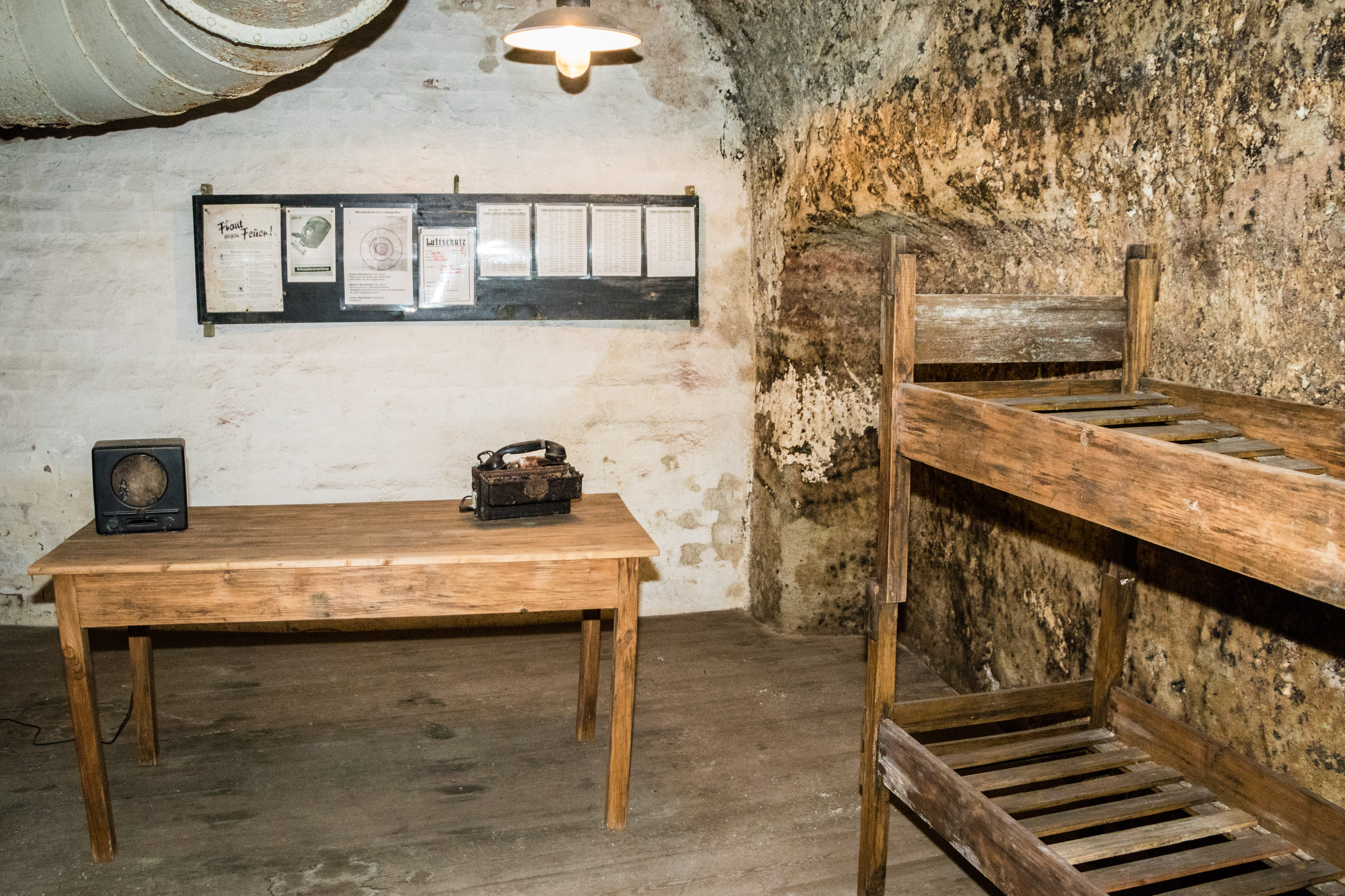 Historischer Kunstbunker, Nürnberg, Wache